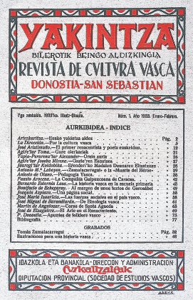 Yakintza